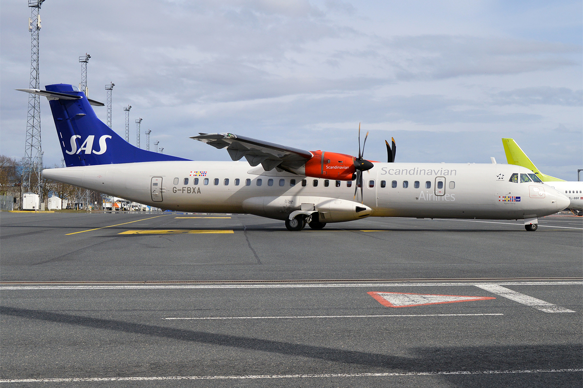 SAS, G-FBXA, ATR 72-600